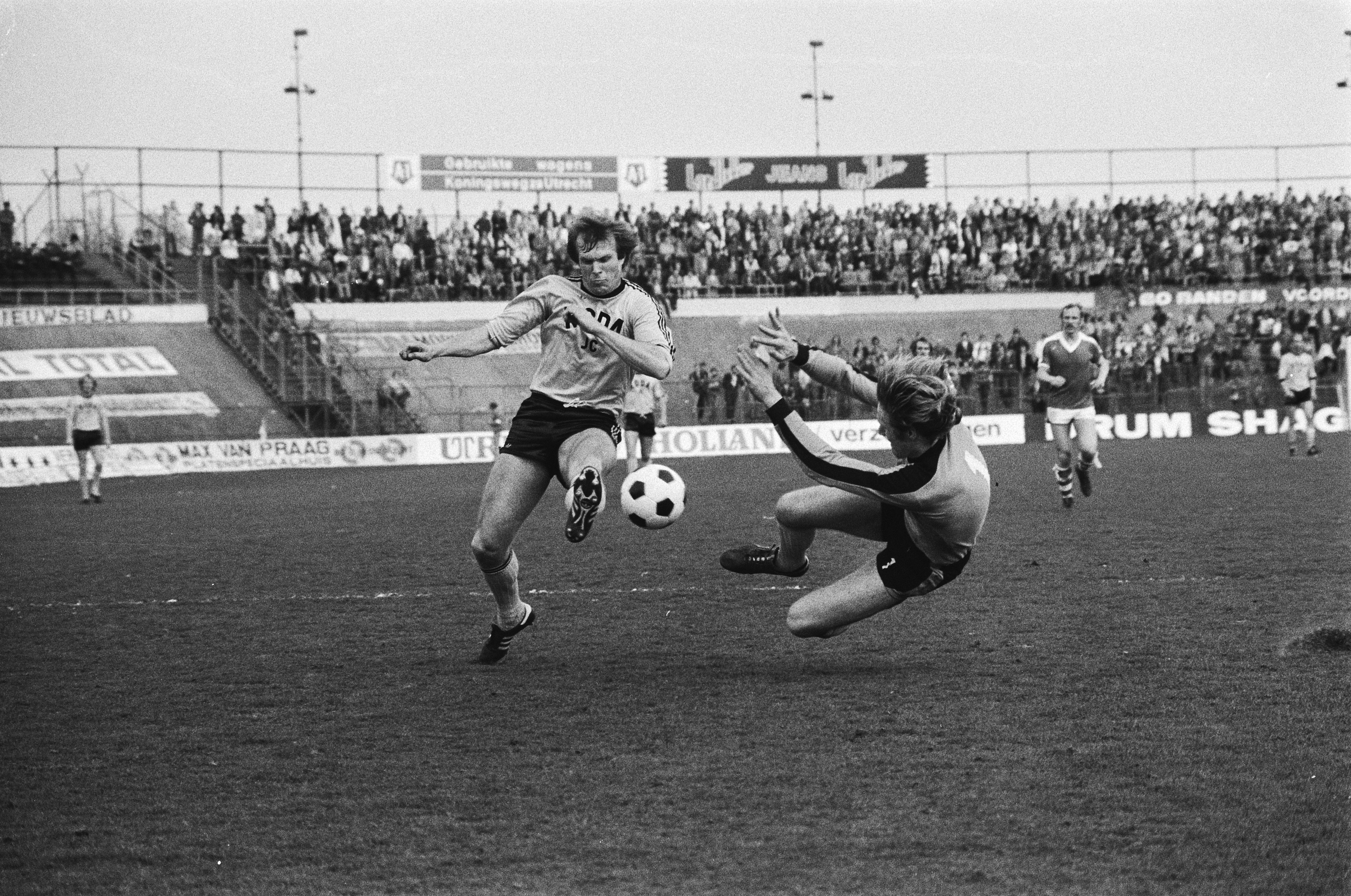 Match de football FC Utrecht - Roda JC (1-0), Theo de Jong face au gardien d'Utrecht Hans van Breukelen.